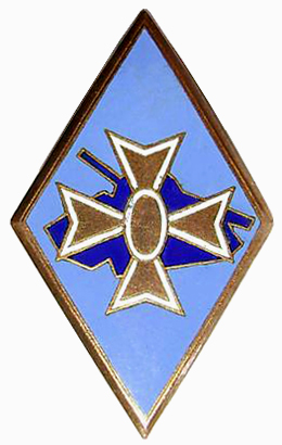 Insigne de la 1ère division blindée française